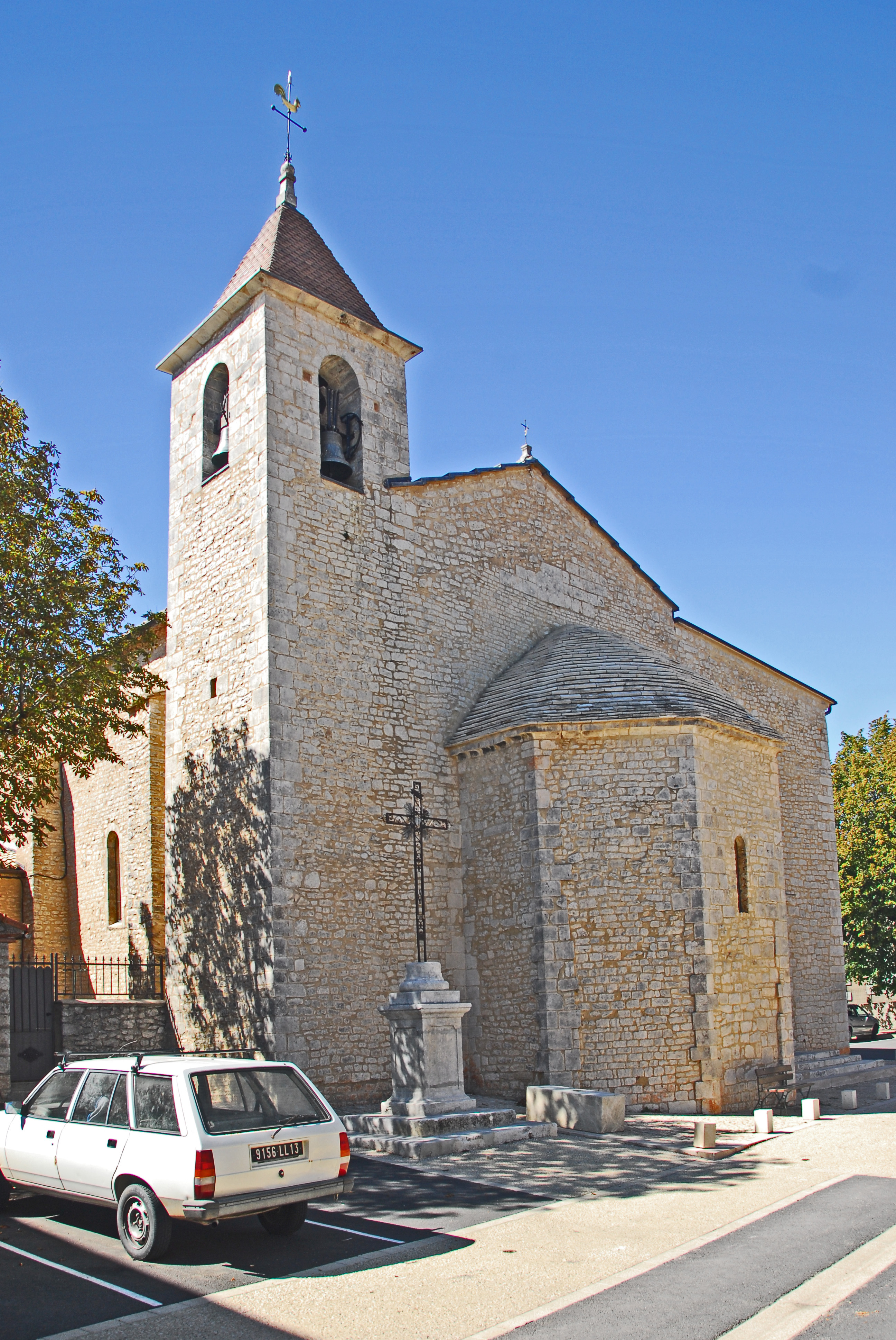 N-D et St-Christophe de St-Christol, Ansicht von SO